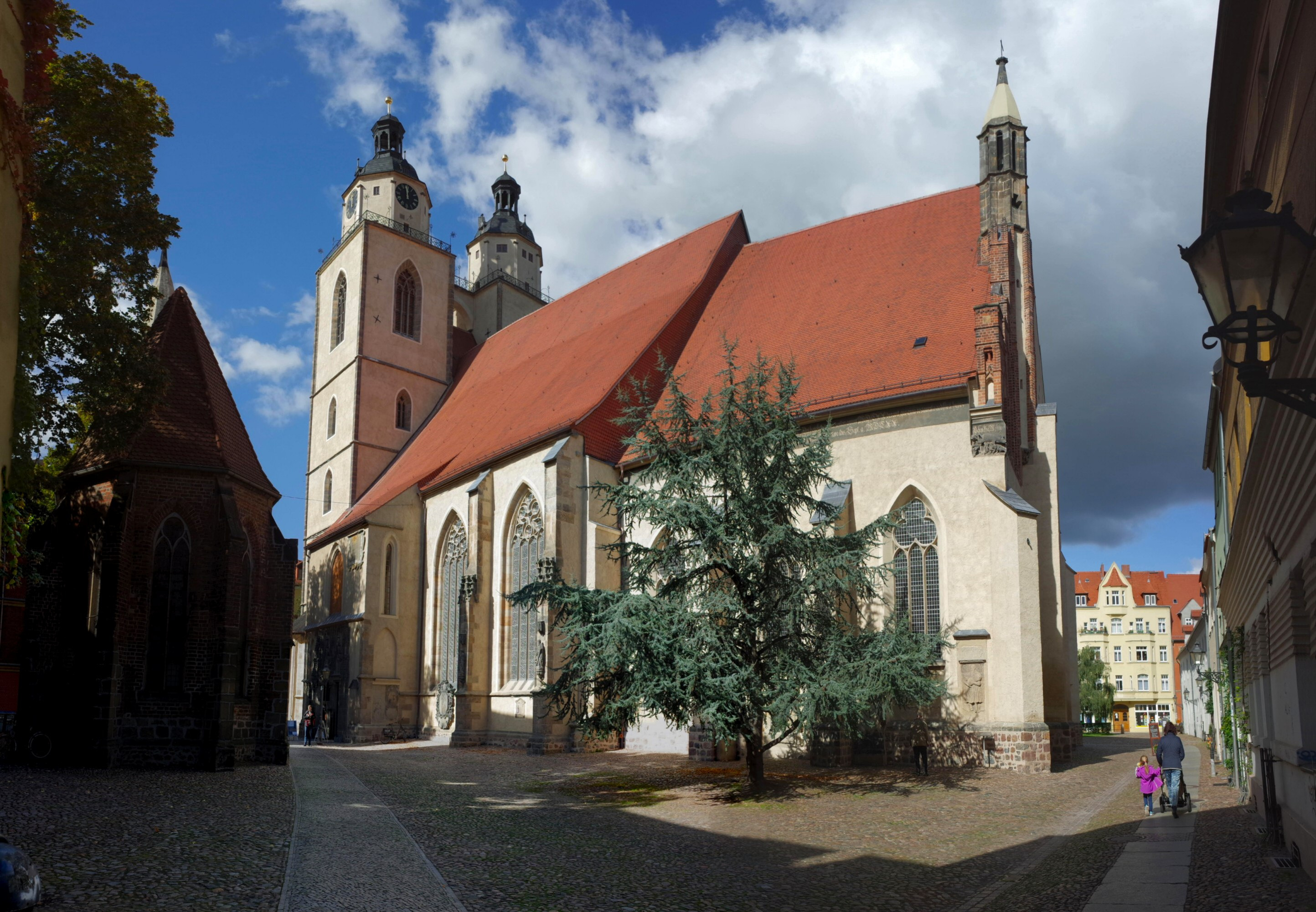 Die Stadsgemeentekerk Sint Marien op die kerkplein van Lutherstad-Wittenberg, Sakse-Anhalt, Duitsland